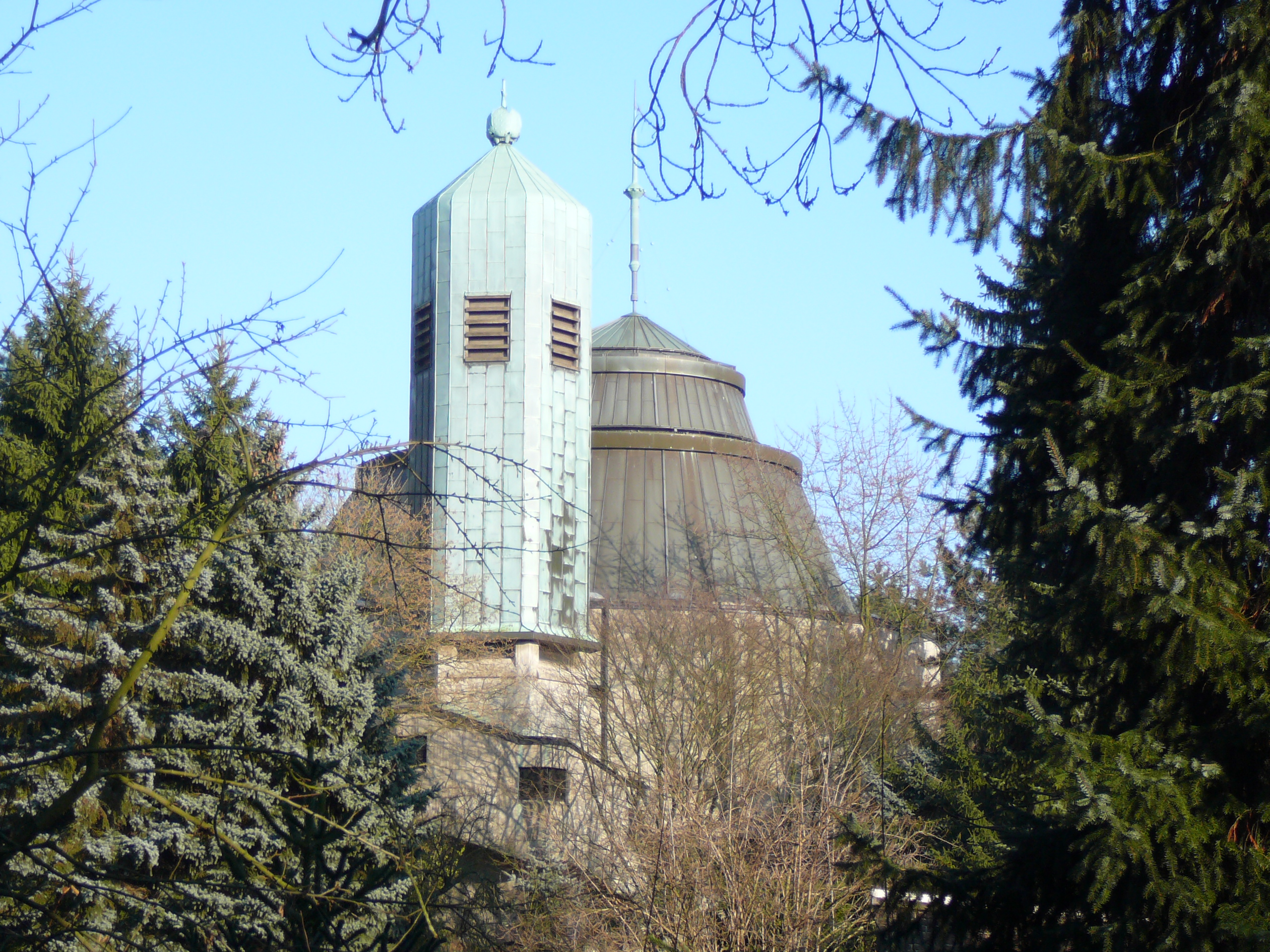 Am Turn, Wuppertal